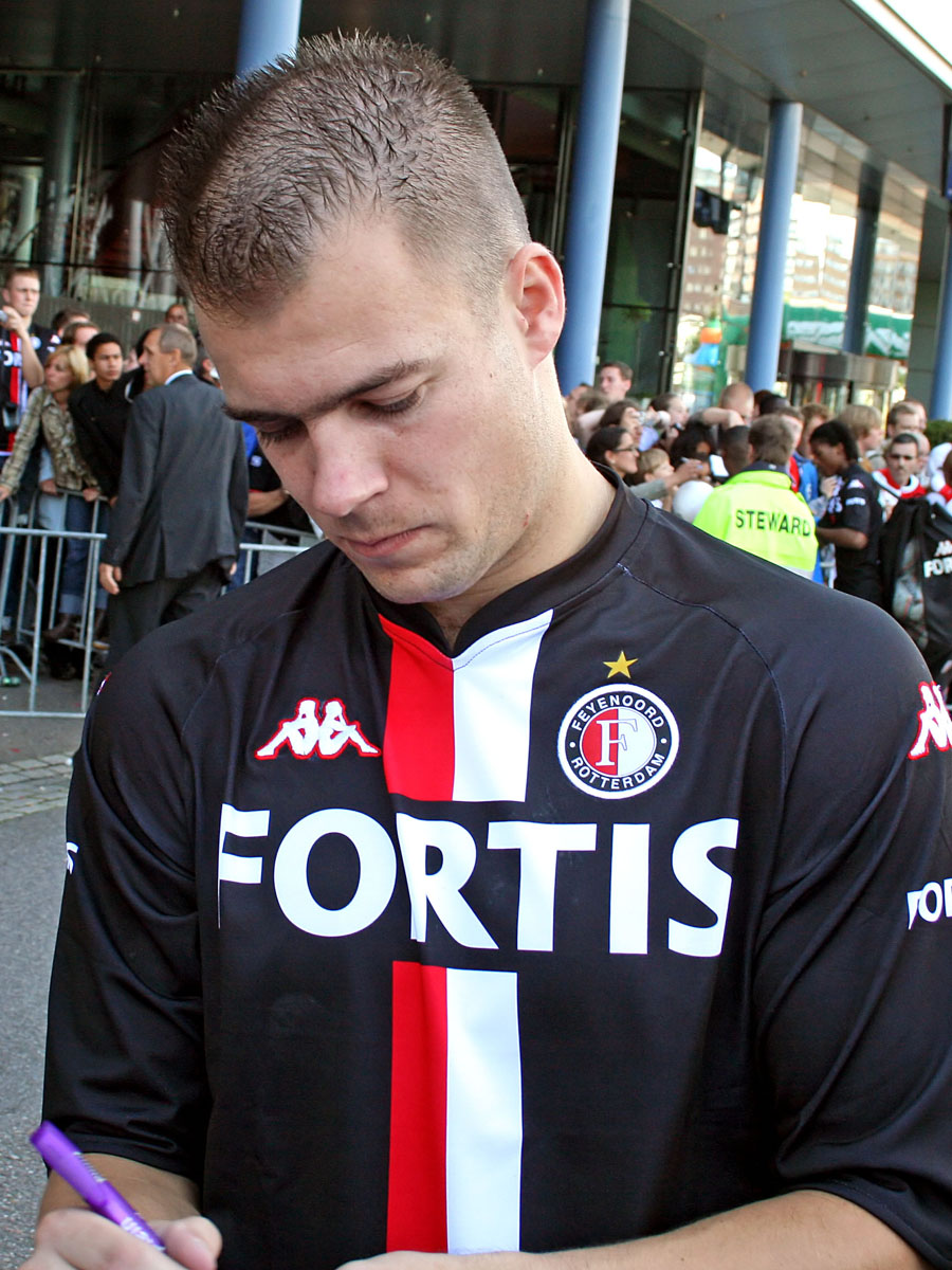 Danny Buijs (Feyenoord)